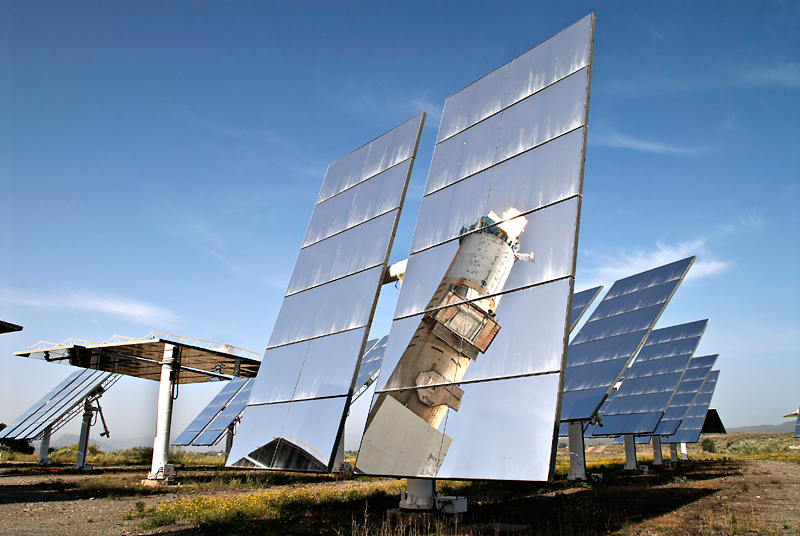 Campo de heliostatos CESA-1